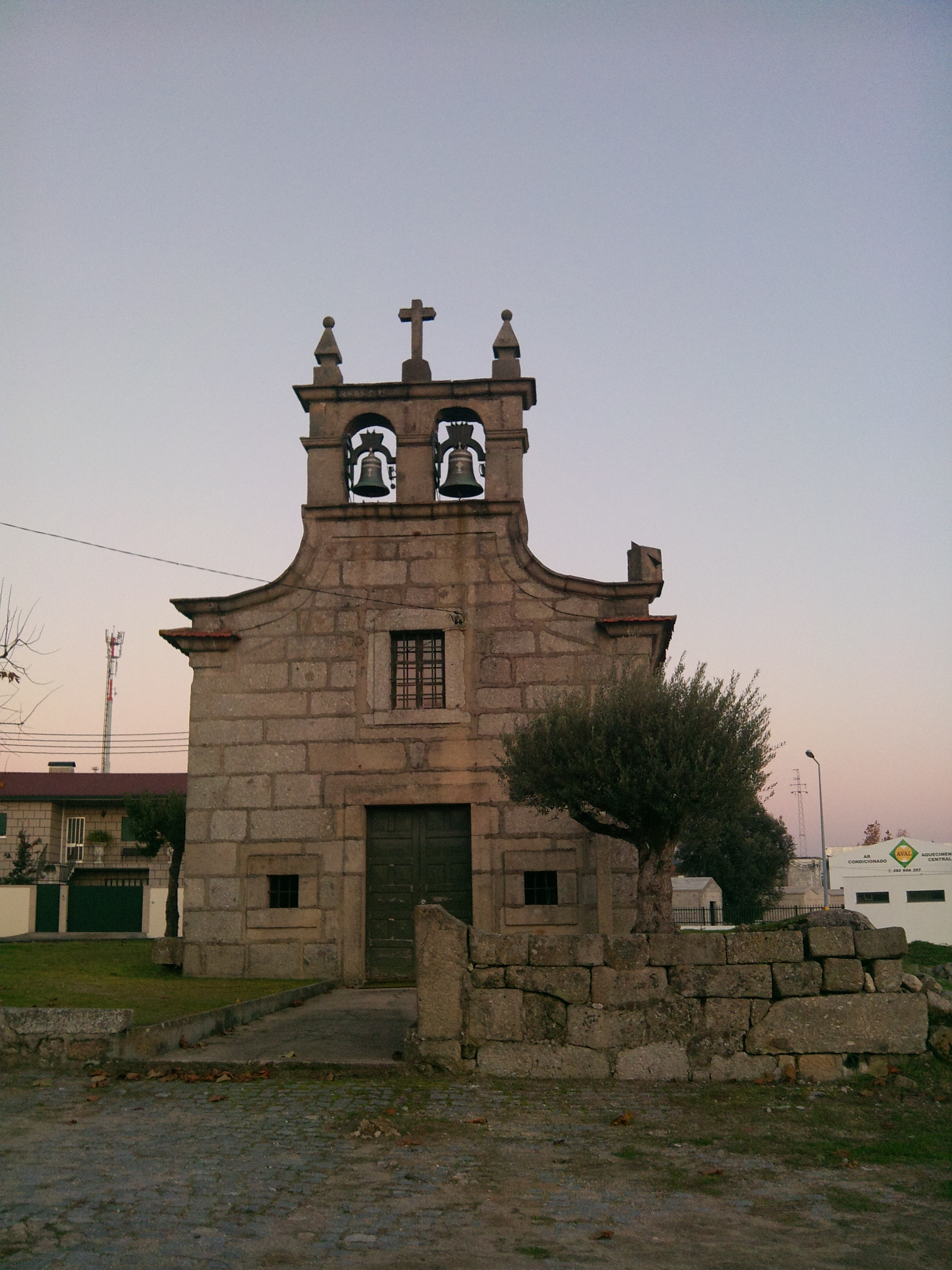 Antiga Igreja de Bairro